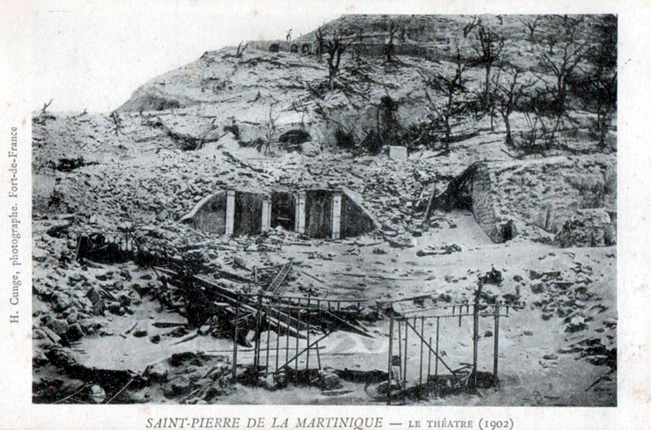 Ruines du théâtre de Saint-Pierre de la Martinique après l'éruption de la Montagne Pelée le 8 mai 1902